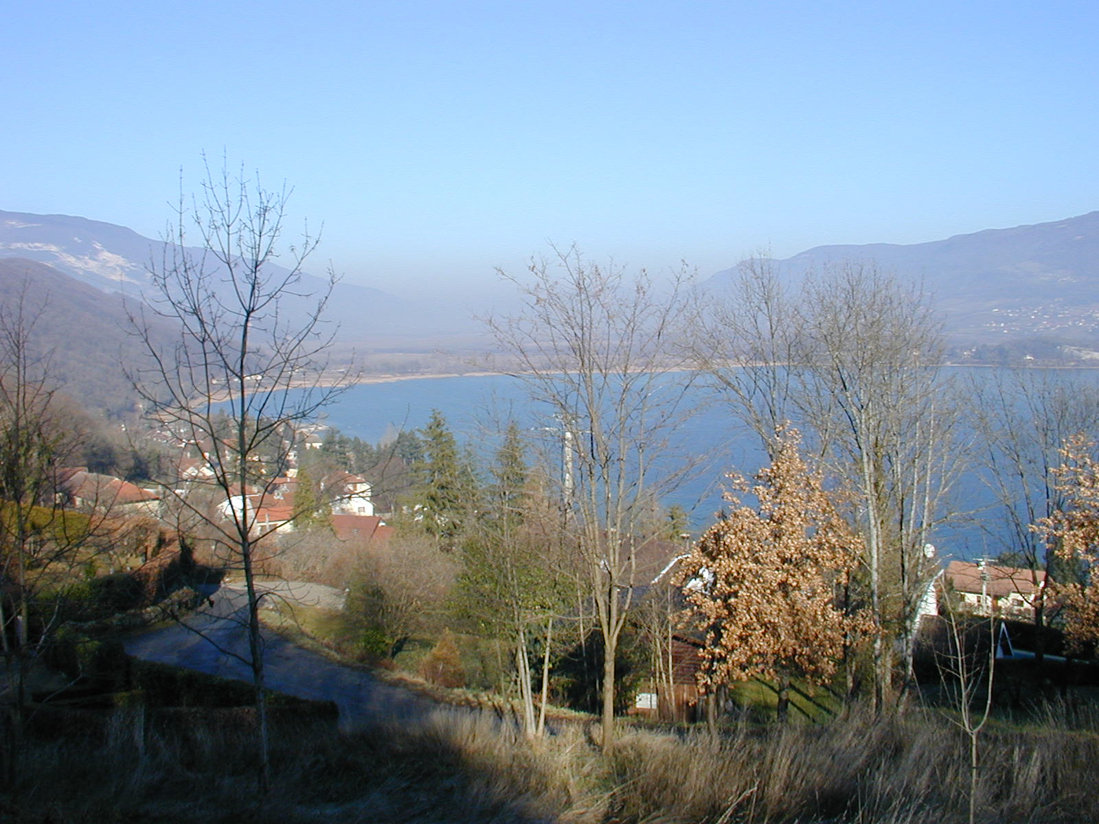 Le fond nord du Lac du Bourget vu depuis le haut du village de Conjux avec le début du vaste marais de Chautagne. Tout au fond à gauche, la montagne du Grand Colombier (département de l'Ain); tout au fond à droite, la montagne du Gros Foug (département de Haute-Savoie). Photographie prise par Semnoz en janvier 2005. Semnoz, January 2005.